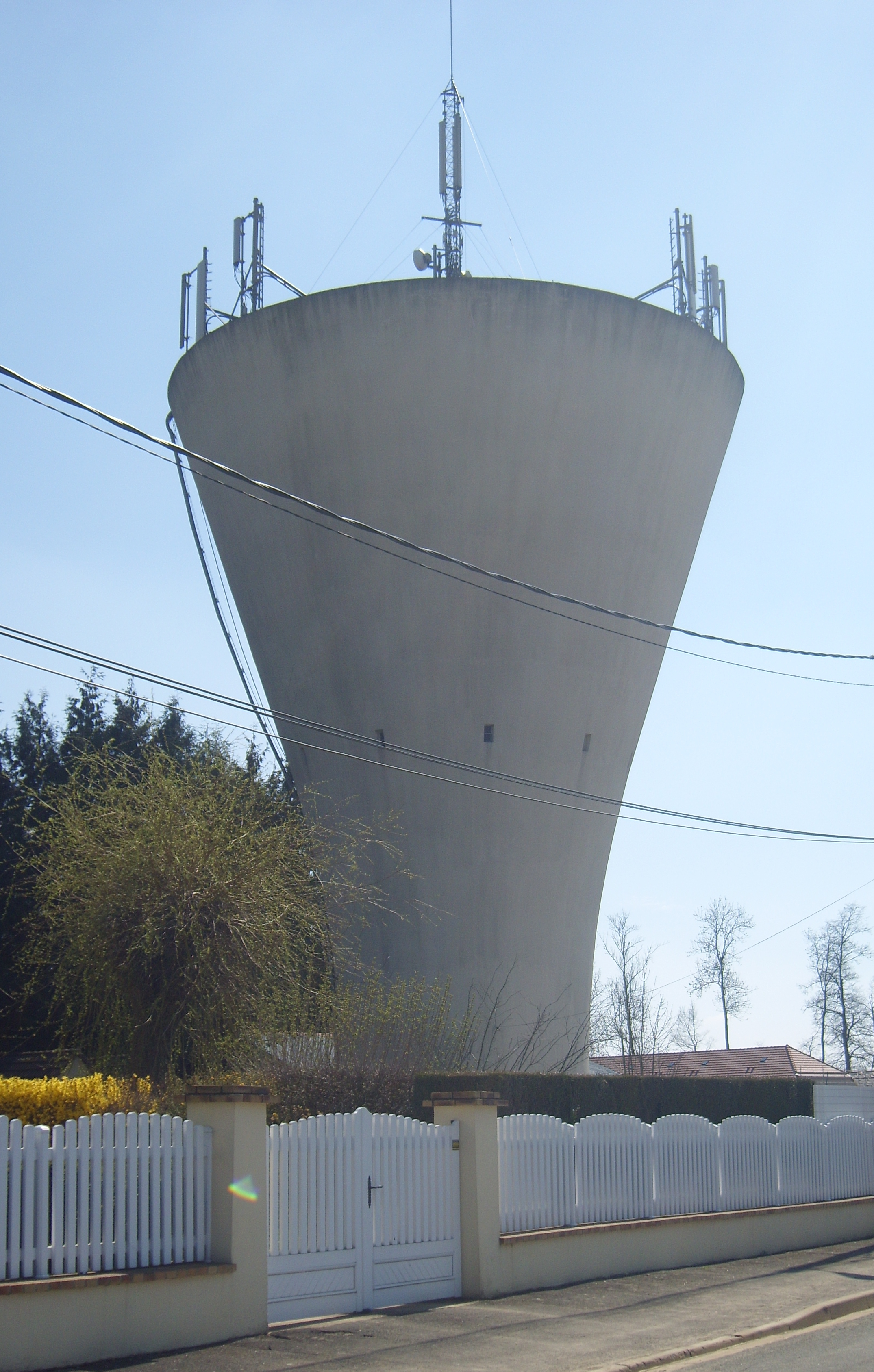 Château d'eau rue Émile Zola Fontenay-Trésigny